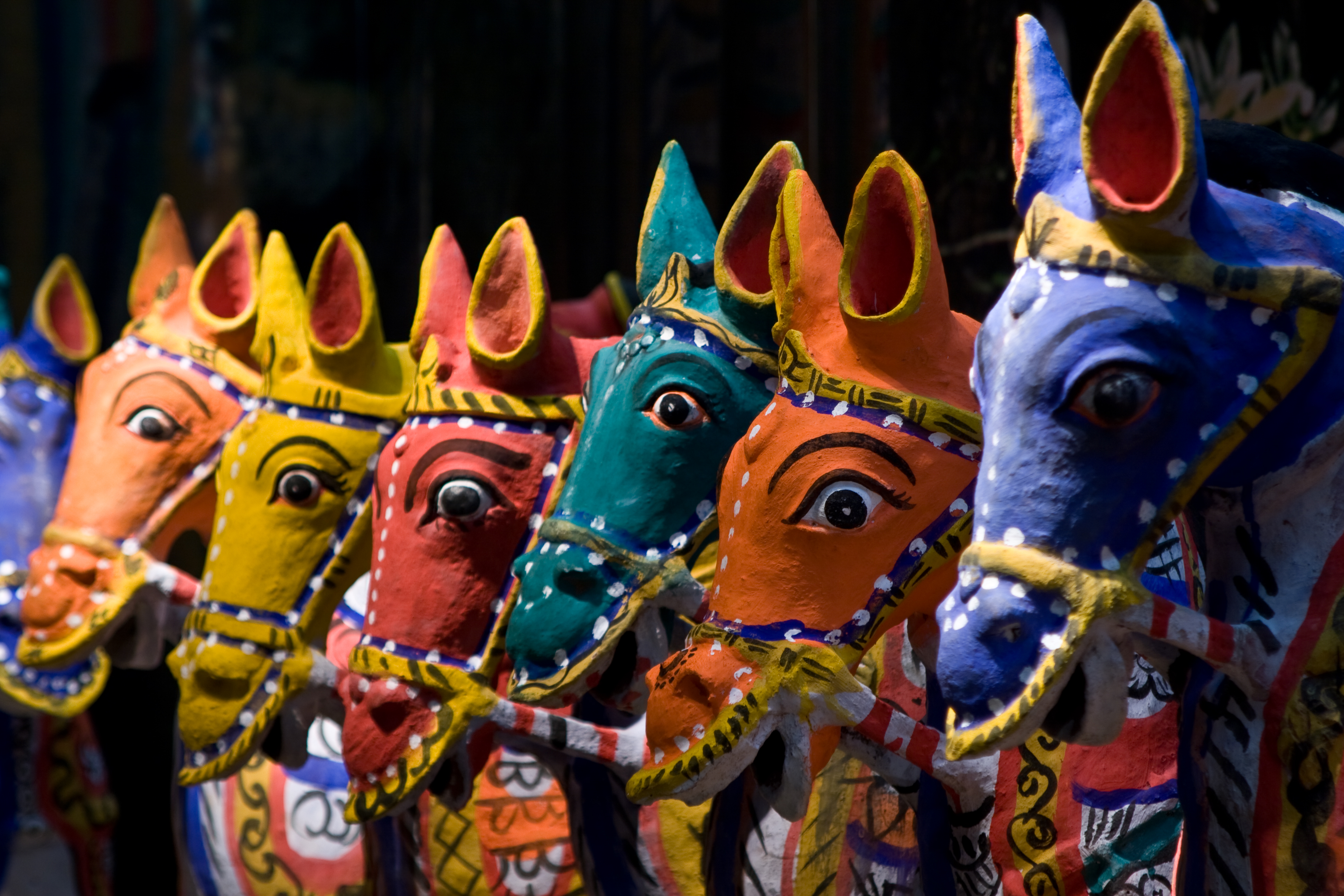 Aiyanar-Paarden (R-504) Tropenmuseum - Aiyanar-paarden